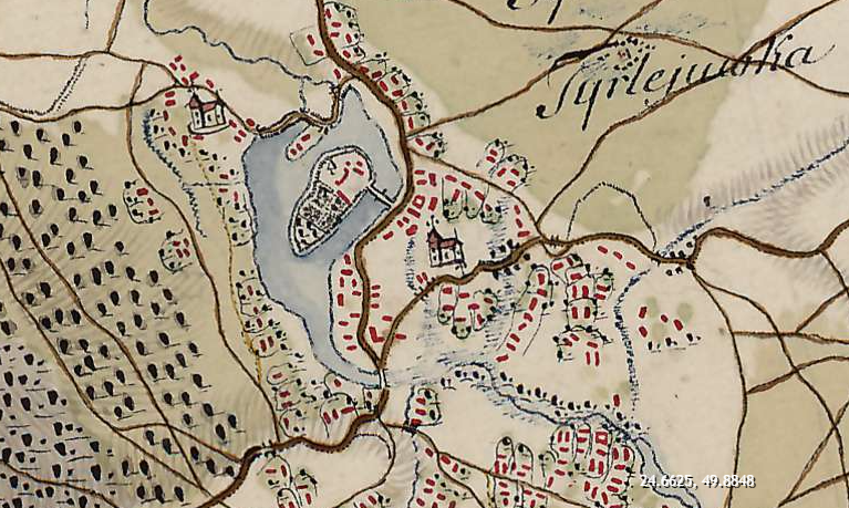 xviiith